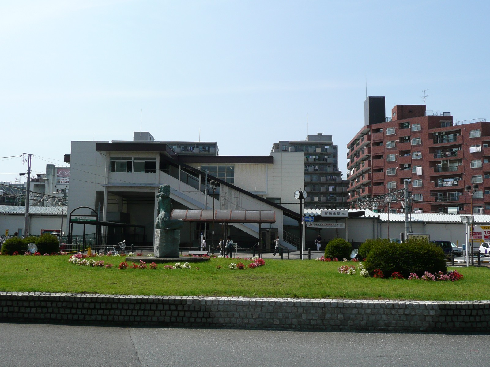 新狭山駅南口